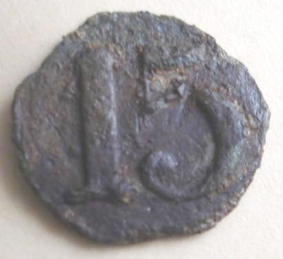 Guzik polski okresu powstania listopadowego - 15 Pułk Piechoty Liniowej